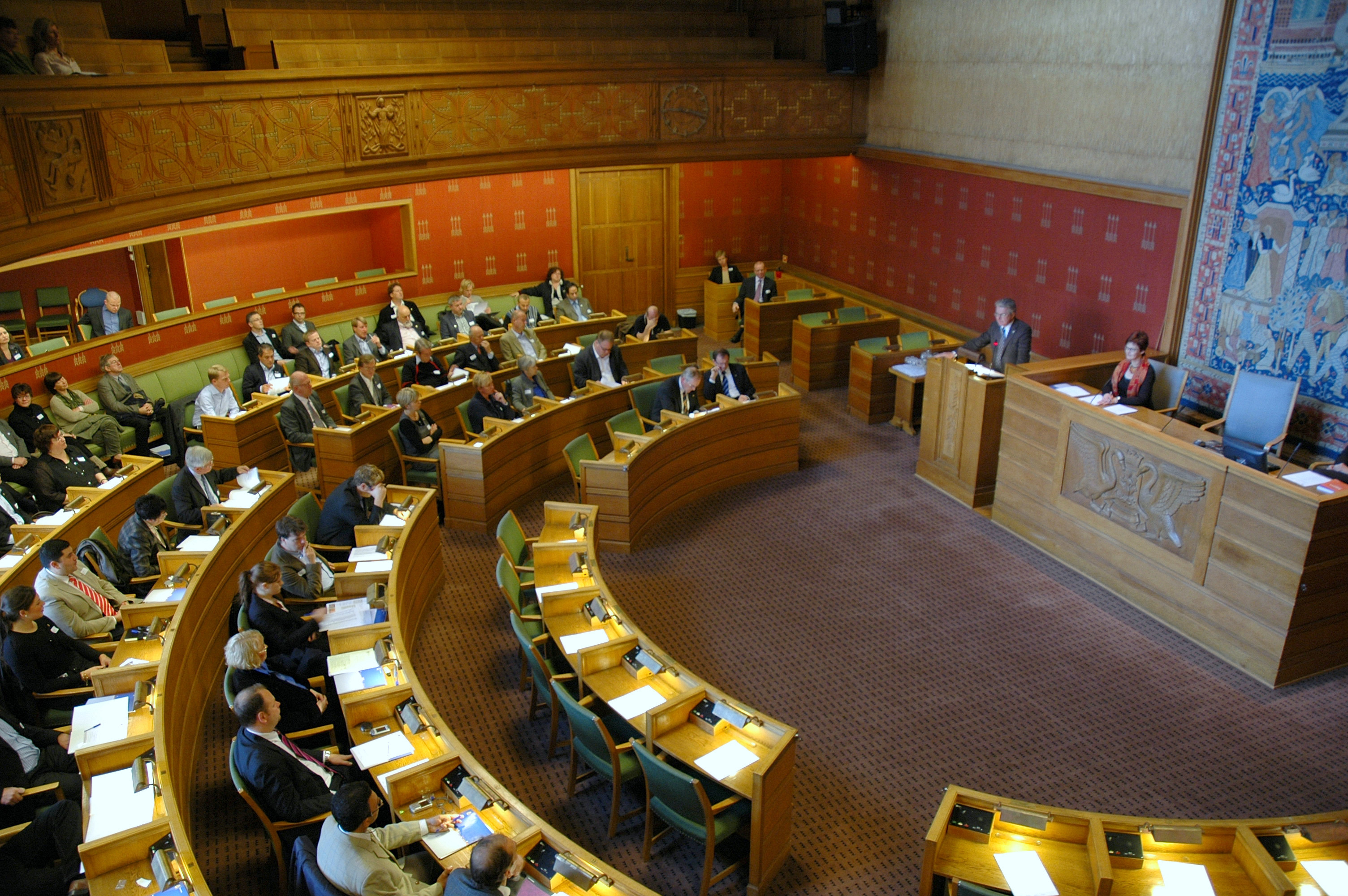 Bystyresalen, Oslo Rådhus